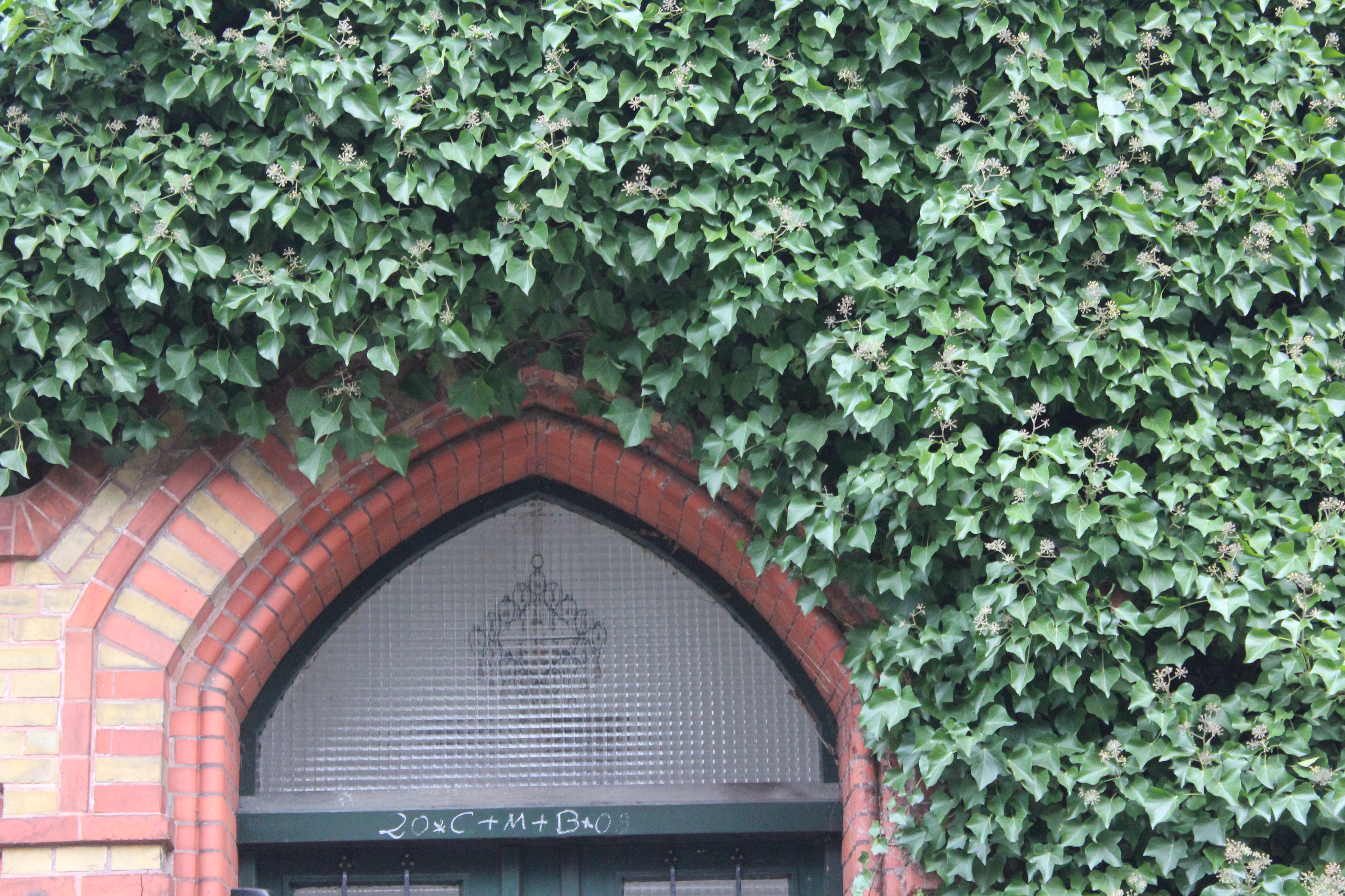 C+M+B 2009 an der Tür der Villa Reepschlägerbahn 30, Bild 001